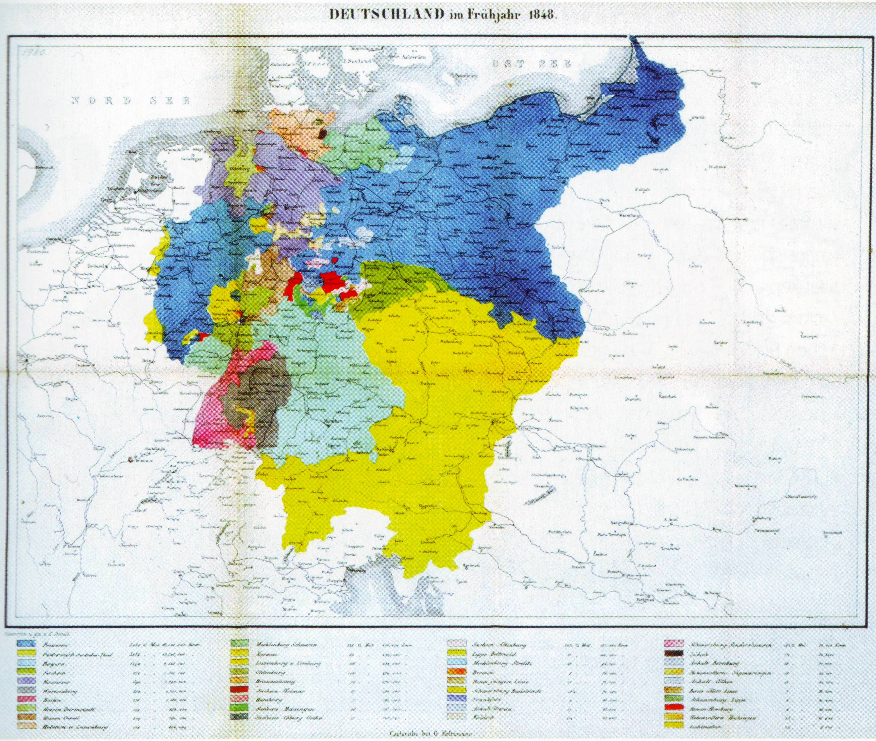 Kolorierte Lithographie. H. Straub, um 1850. Staaten des Deutschen Bundes im Frühjahr 1848.